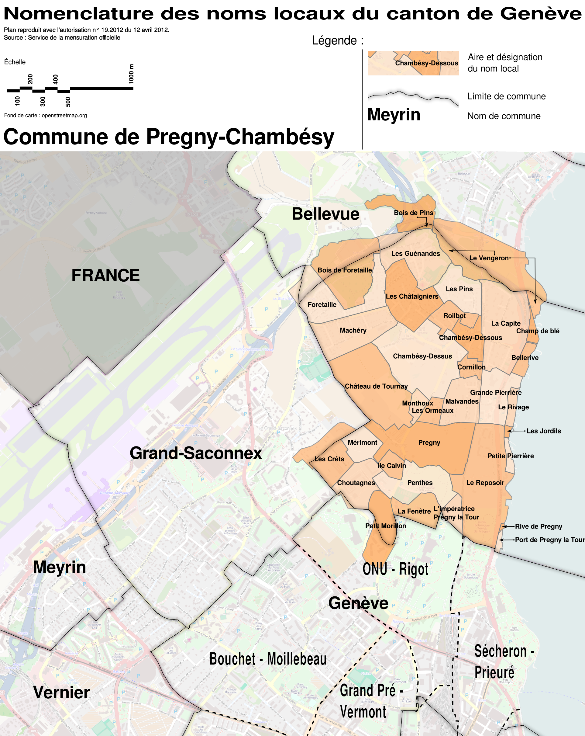 Nomenclature des noms locaux du canton de Genève, généralement appelés "Lieux-dit". Cette nomenclature a été recueillie entre 1932 et 1953 lors de la création du Plan d'Ensemble (PE) du canton de Genève. Plan reproduit avec l'autorisation n° 19.2012 du 12 avril 2012. Source : Service de la mensuration officielle.